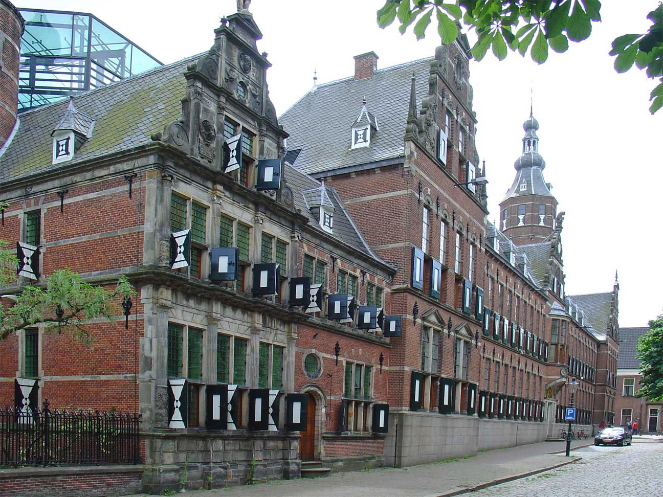 Provinciehuis Groningen (voorzijde)